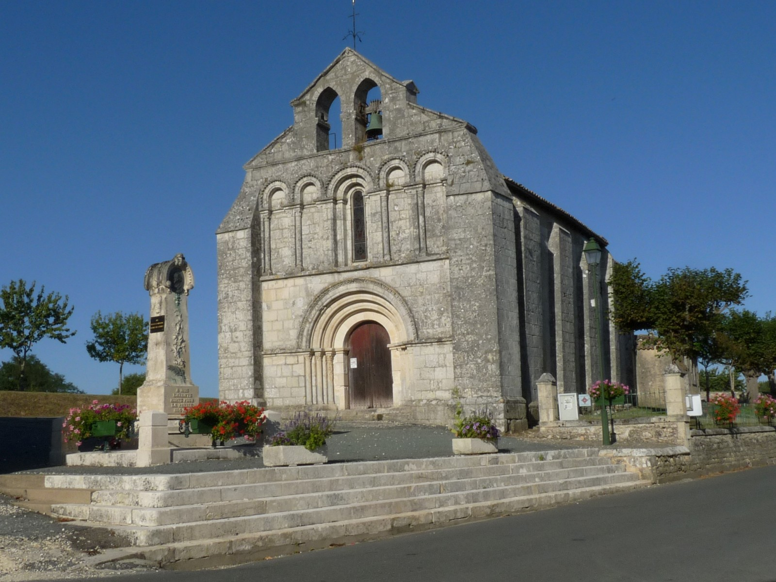 Eglise de St-Palais, Gironde, France